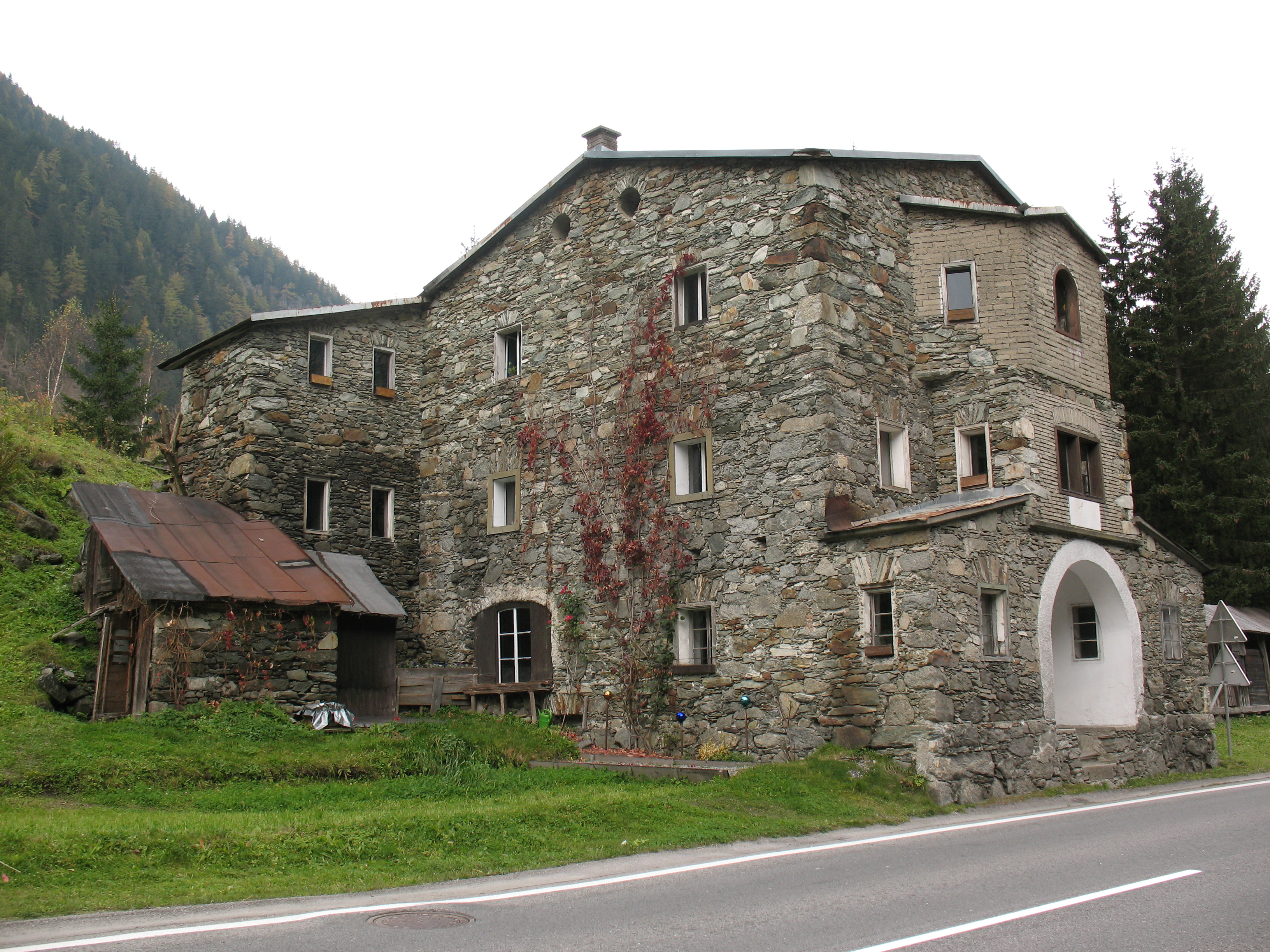 Ehem. Mauthaus